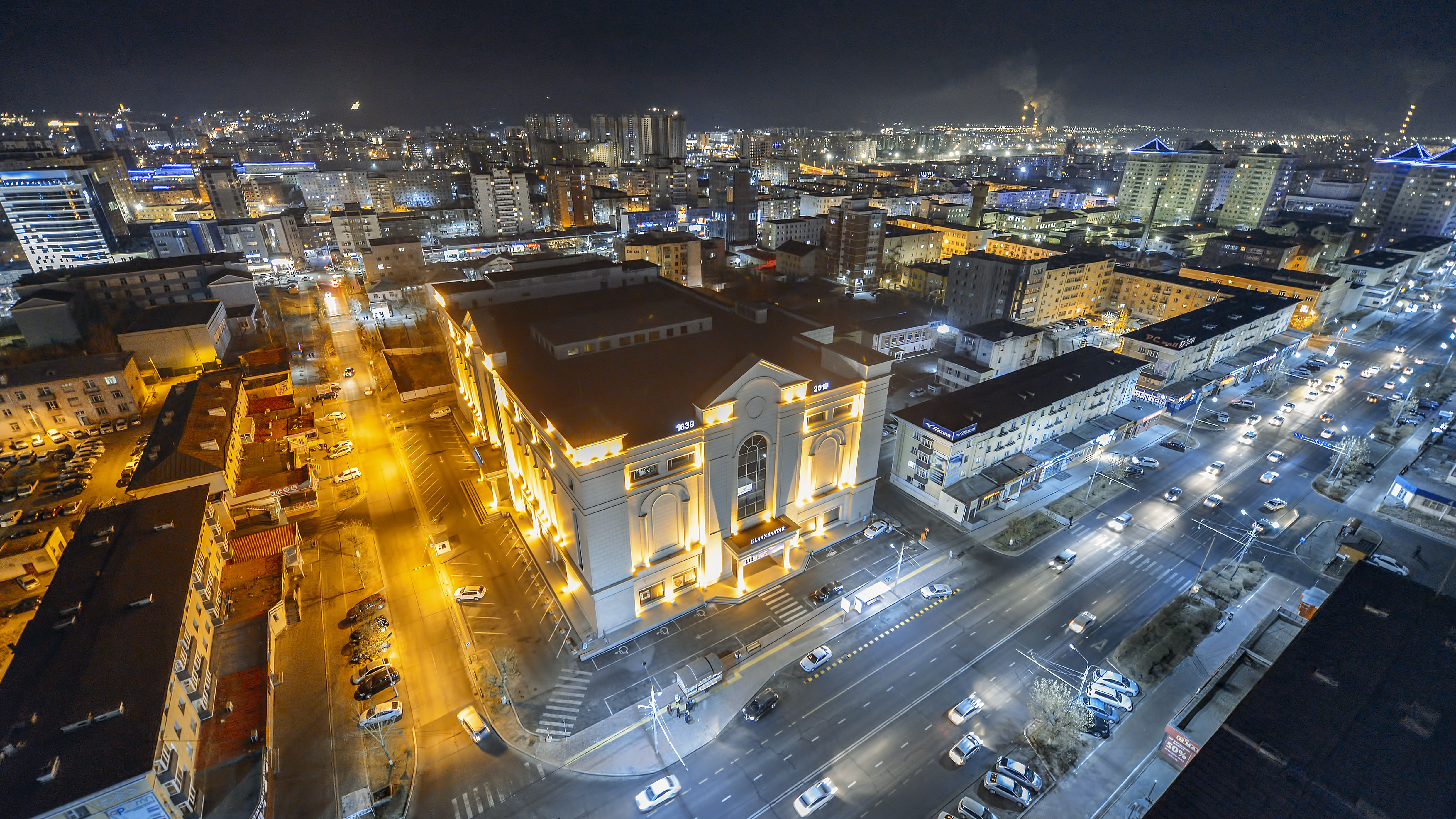 Монгол: Улаанбаатар их дэлгүүр